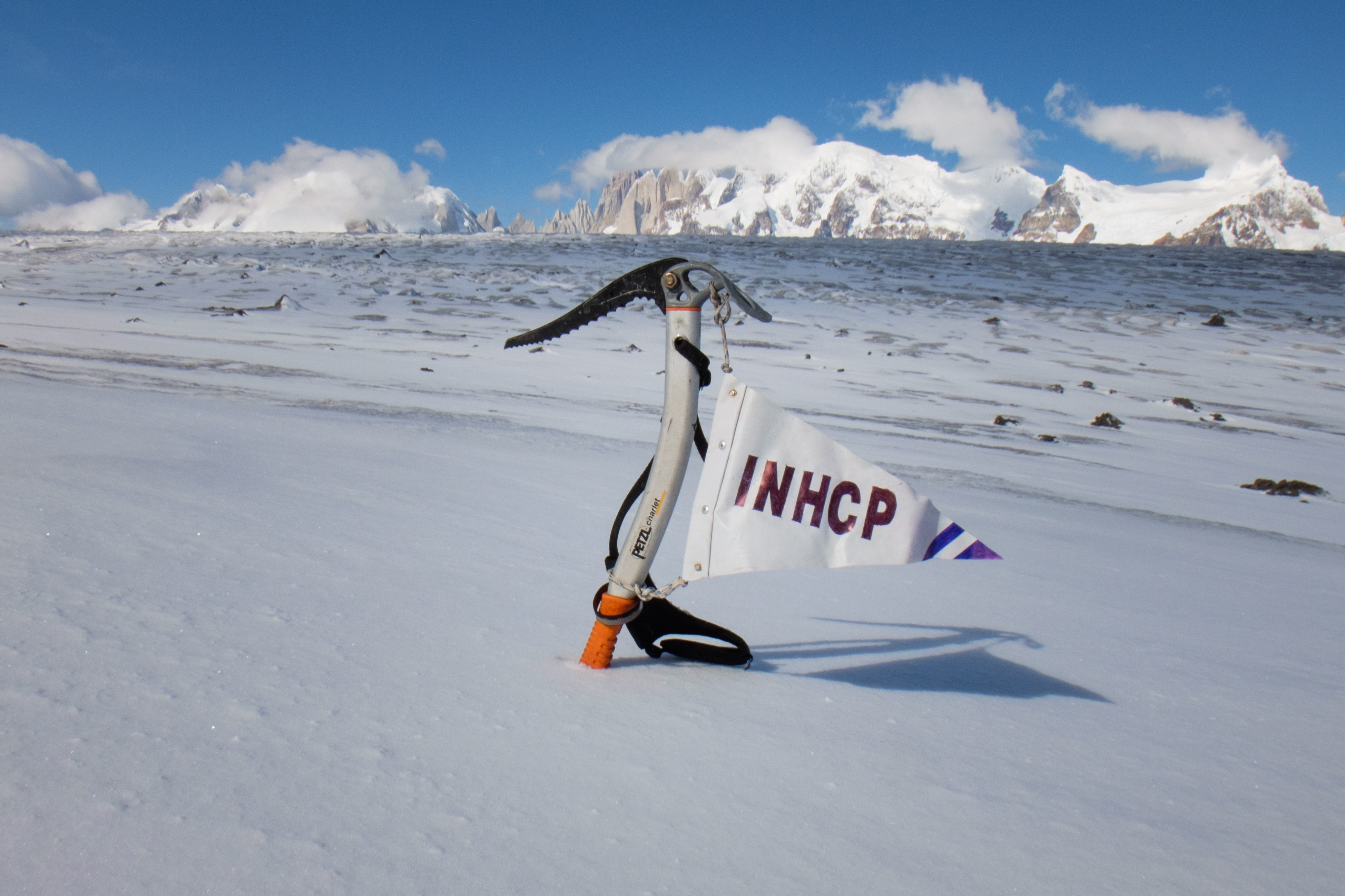 Circo de los altares visto desde el extremo sureste del Nunatak Witte.